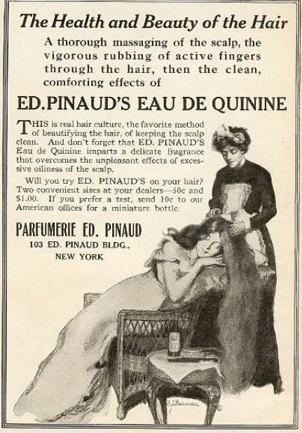 Publicité pour l'Eau de Quinine des parfums Ed. Pinaud (succursale à New York, Pinaud Building).